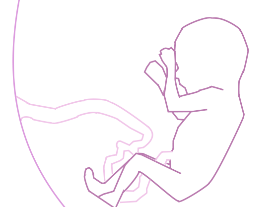 Diciassettesima settimana di gravidanza